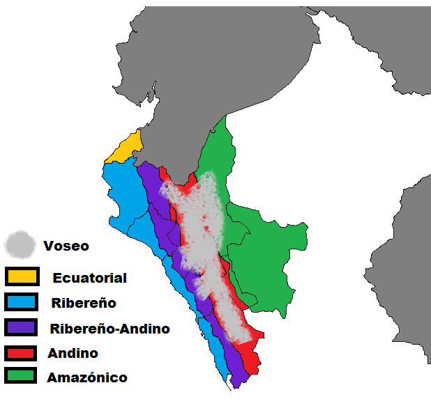 Mapa dialectal y de voseo de la macronorte peru